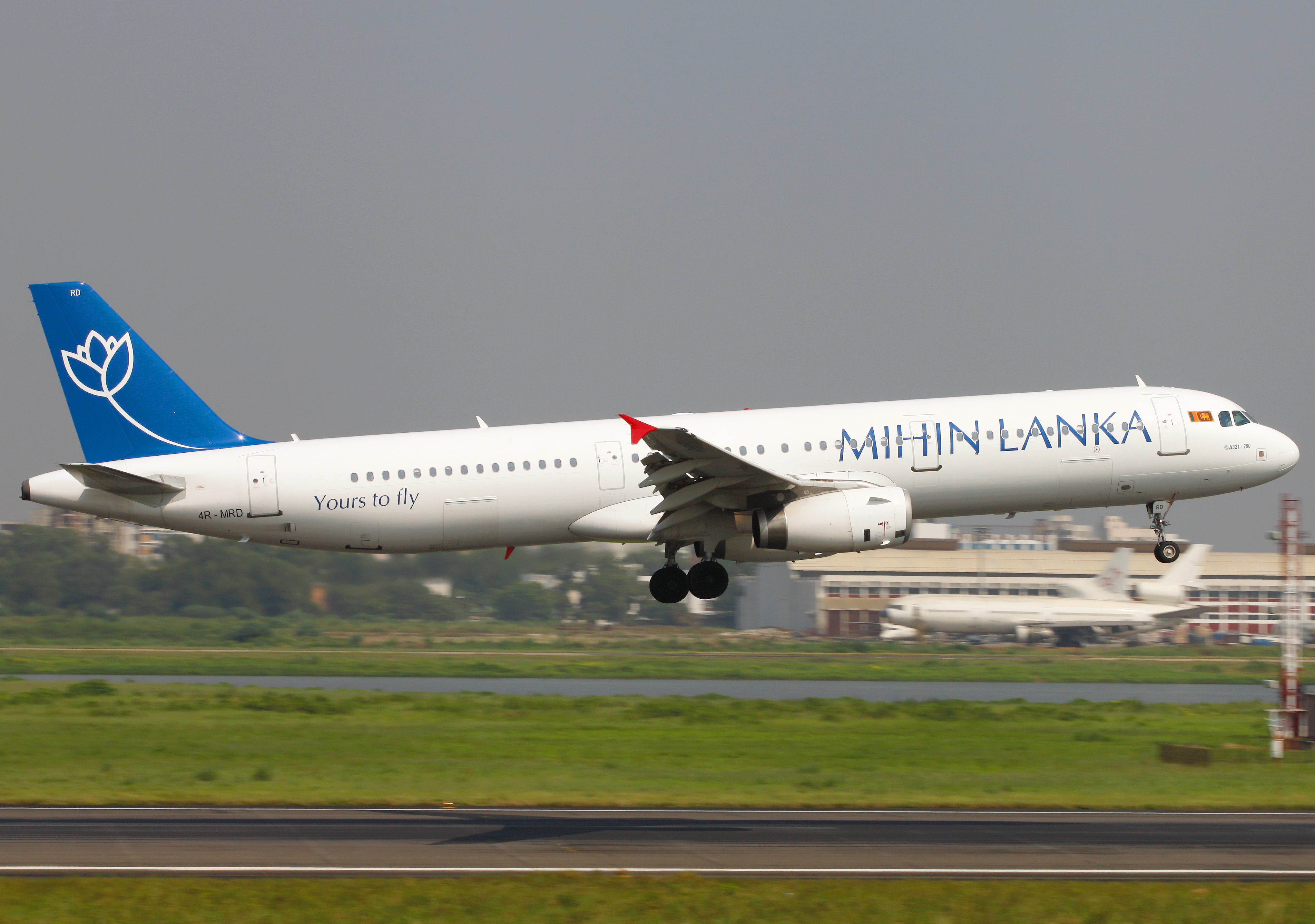 4R-MRD Airbus A321-231 Mihin Lanka Landing at Hazrat Shahjalal International Airport Dhaka ( DAC / VGHS )